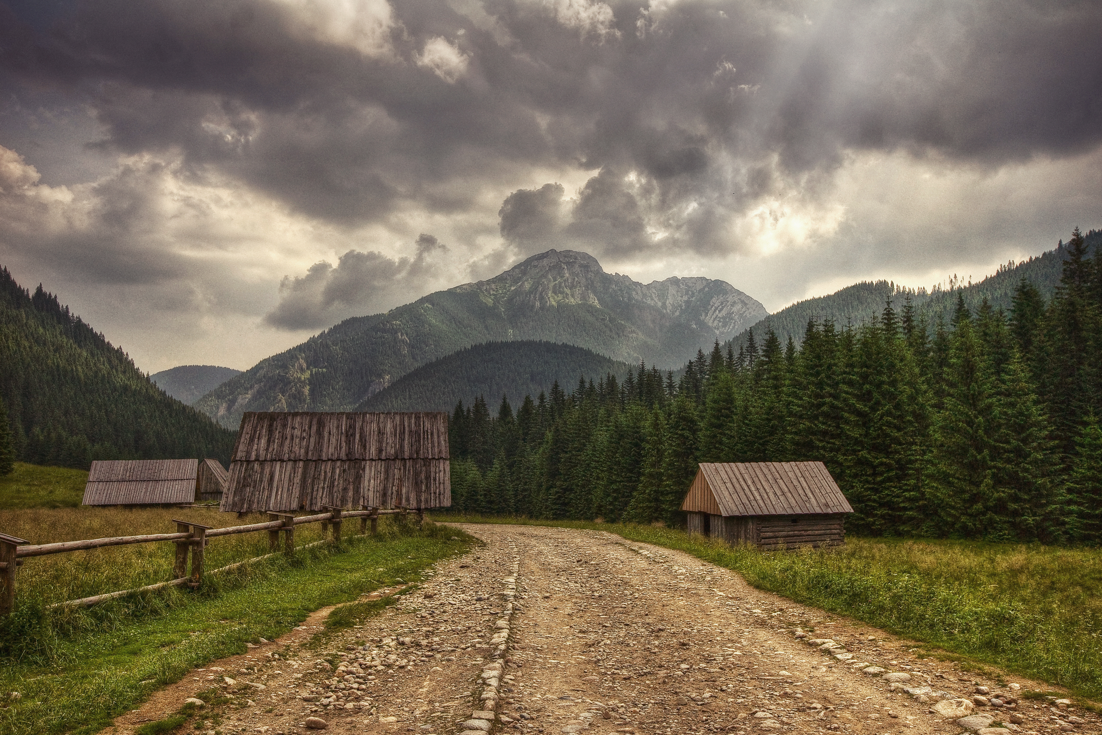 Polana Chochołowska, zespół szałasów